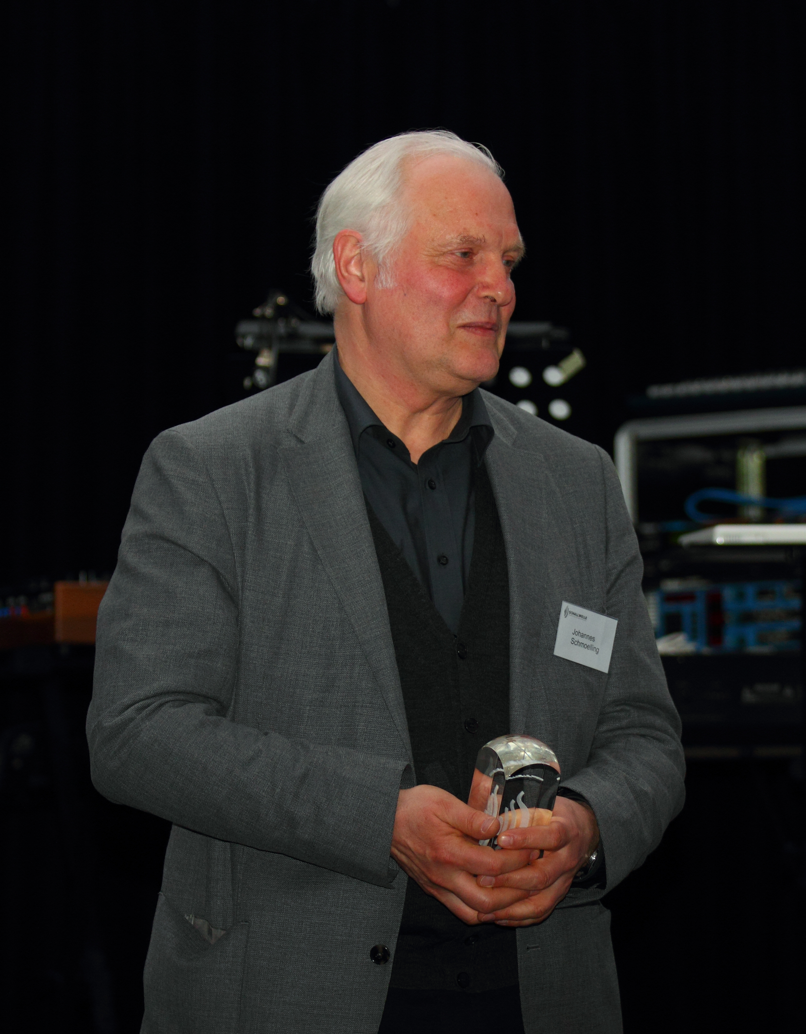 Verleihung des Schallwelle-Musikpreises am 10. März 2012. Kuppel des Planetariums Bochum. Johannes Schmoelling erhält den zweiten Sonderpreis für 2011.